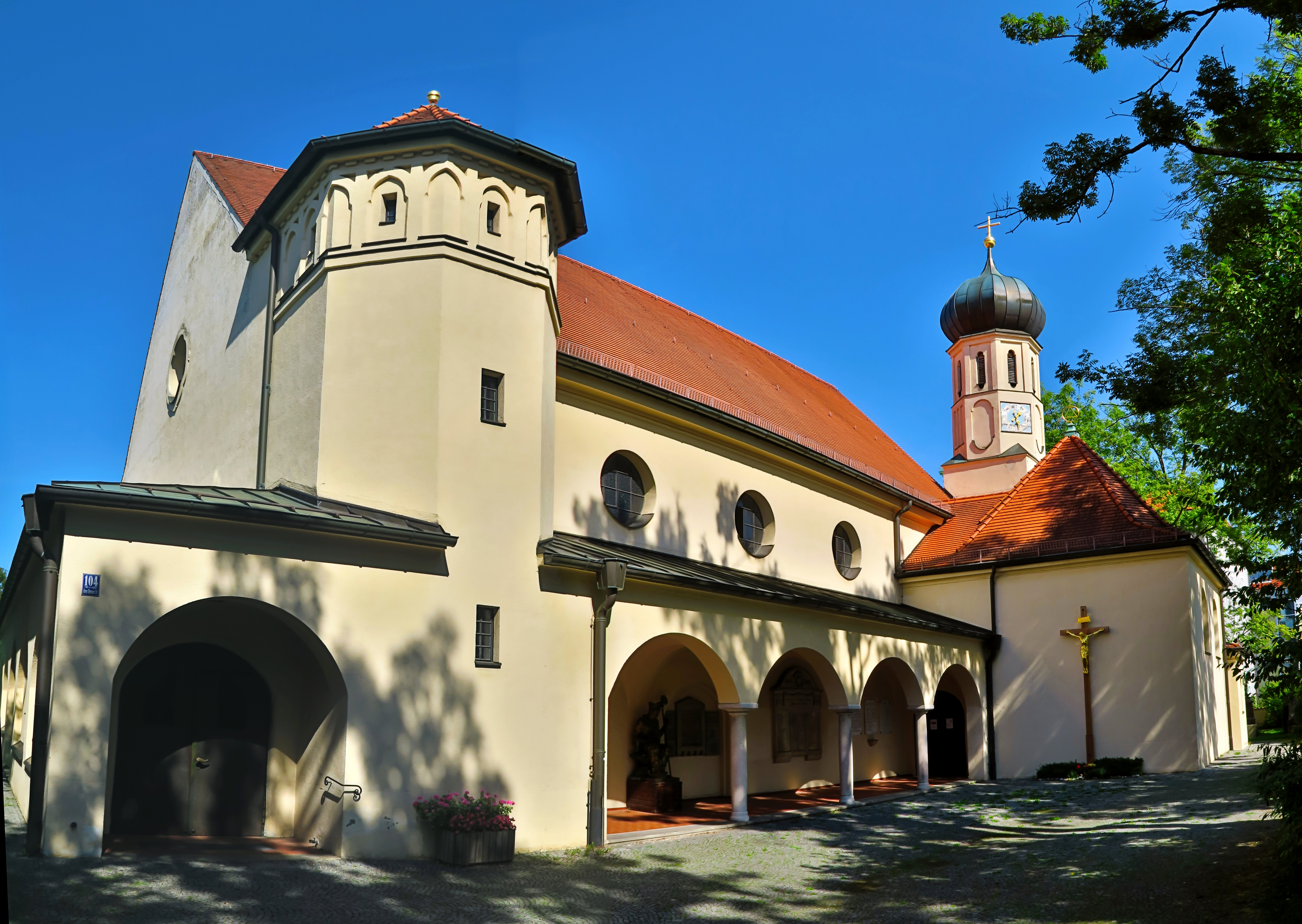 Deutschland, Bayern, Oberbayern, München, Laim, Katholische St. Ulrich Kirche